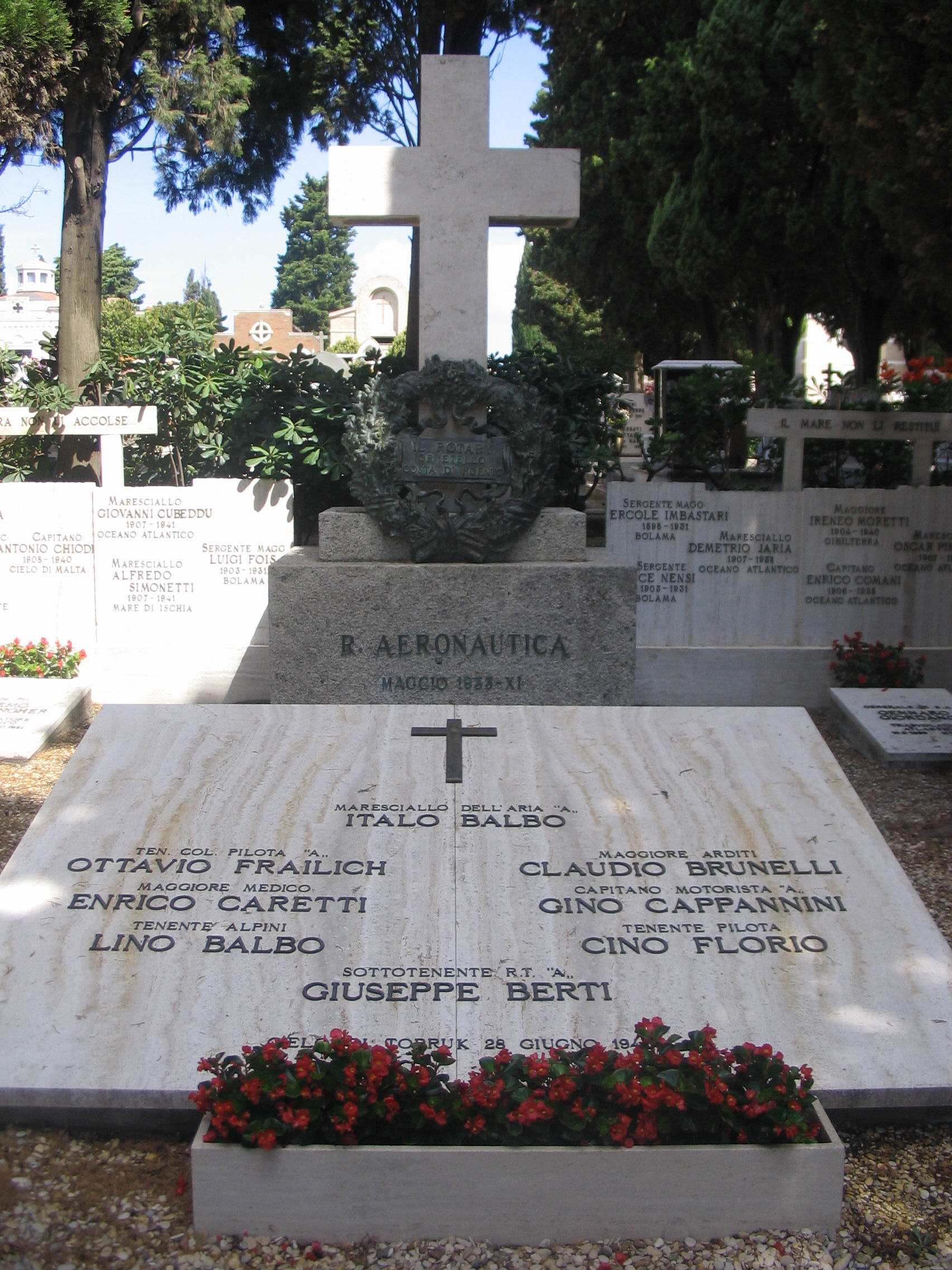 Orbetello, Toscana, Italia